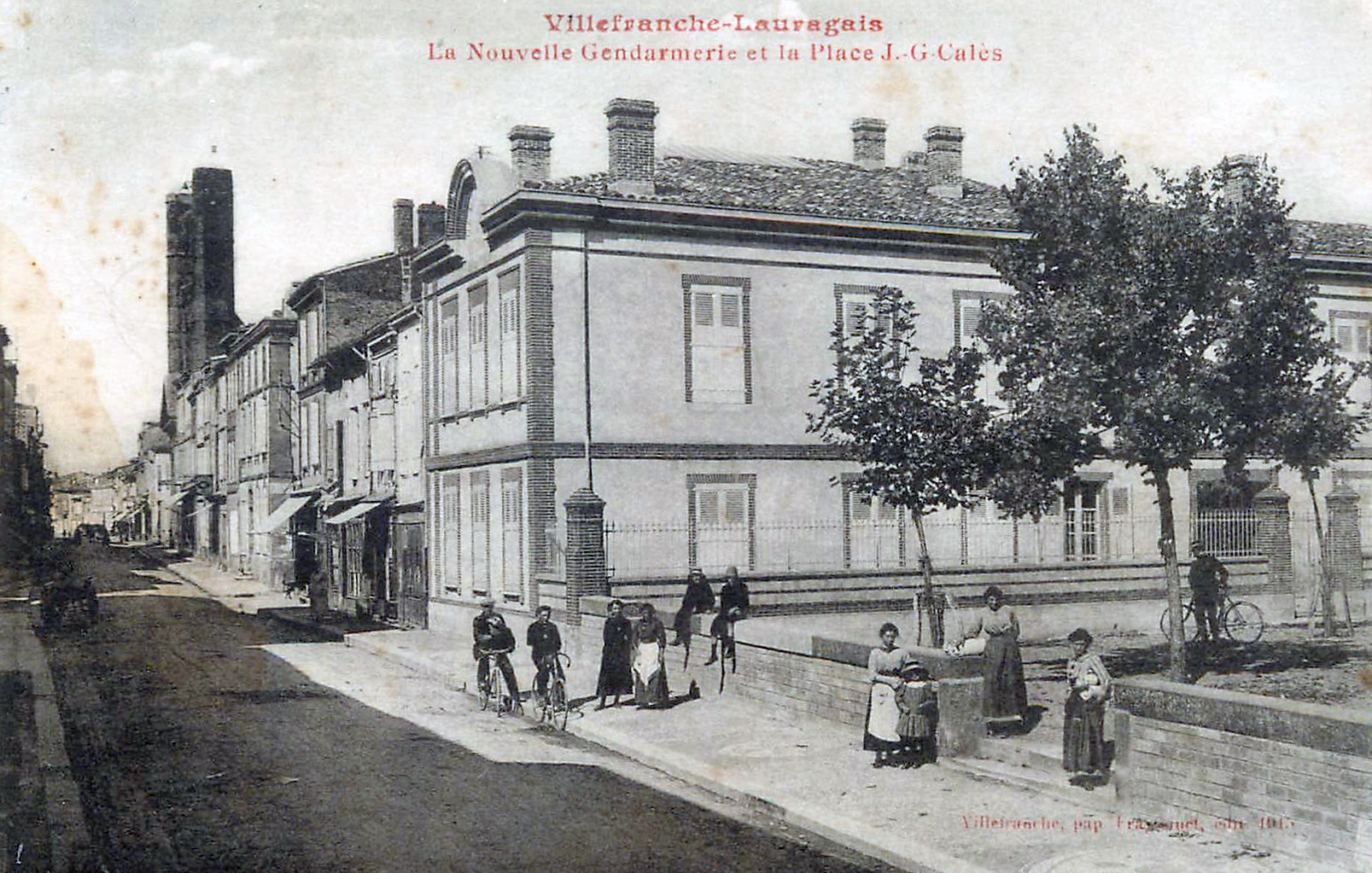 Villefranche-Lauragais, La Nouvelle Gendarmerie et la Place J.-G Calès